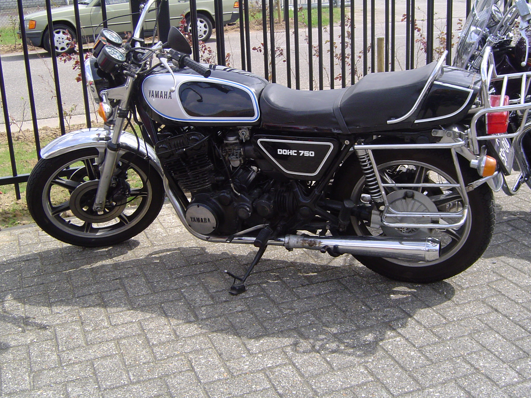 Eigen foto Piero